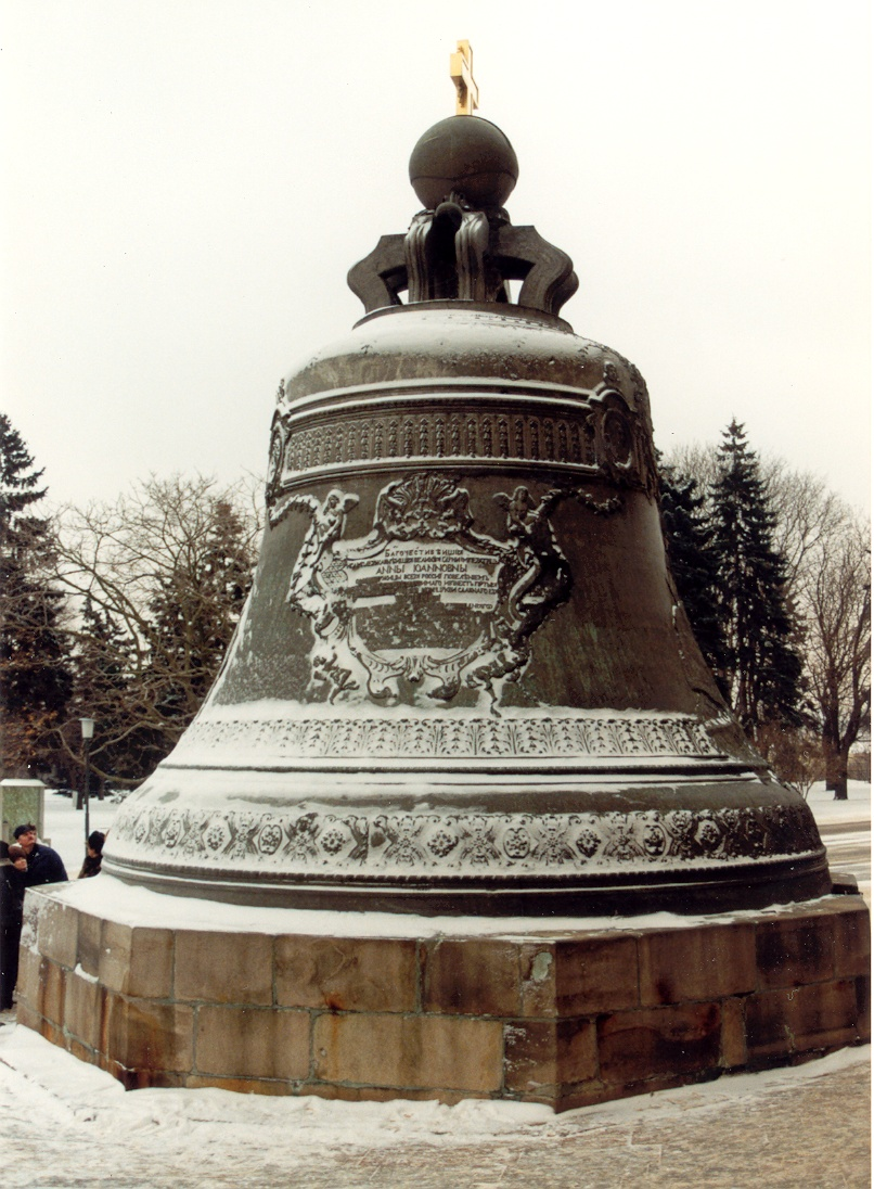 Tsarenklok, Kremlin, Moskou